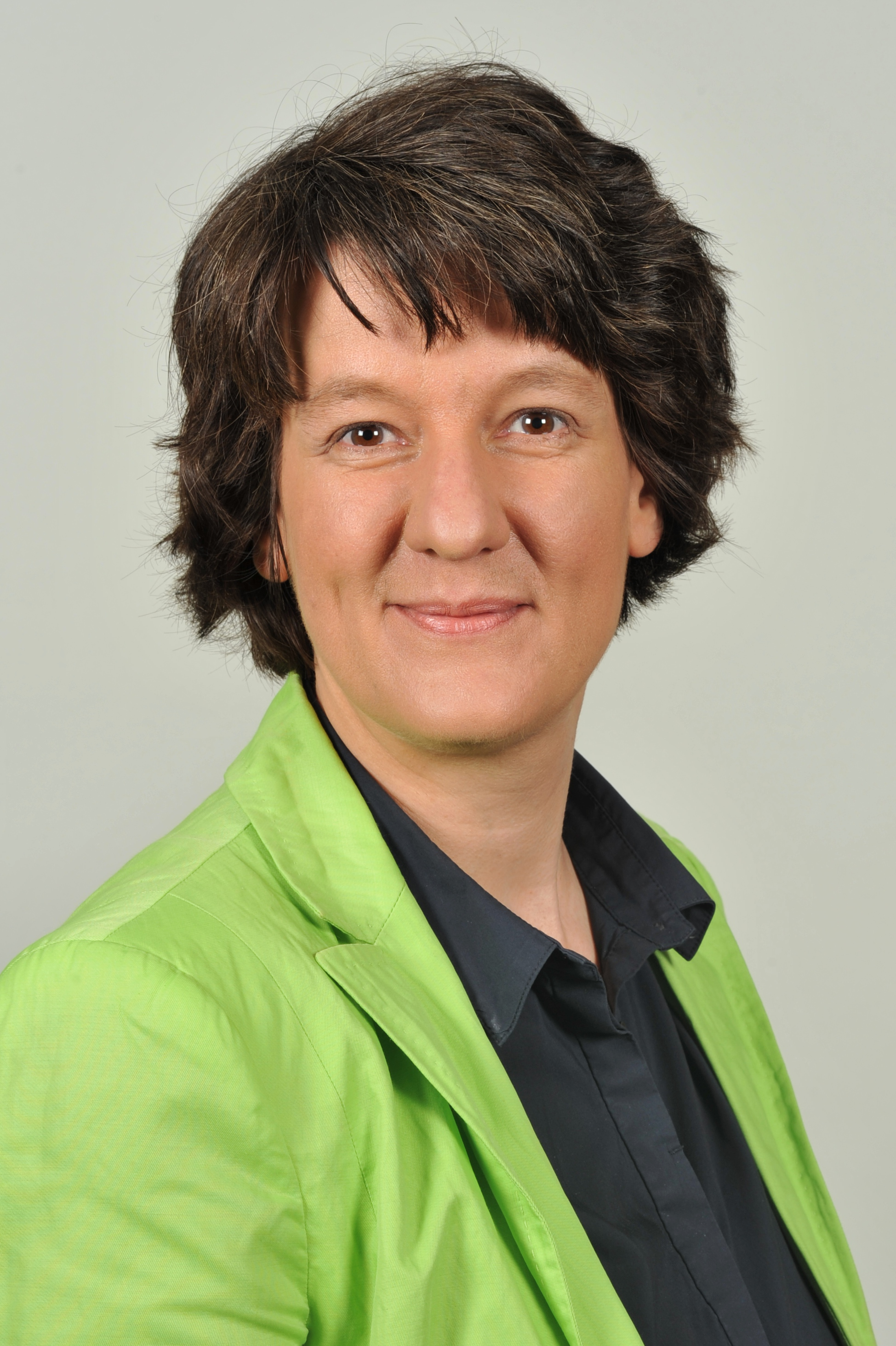 Landtagsprojekt Baden-Württemberg 2013 Gisela Splett